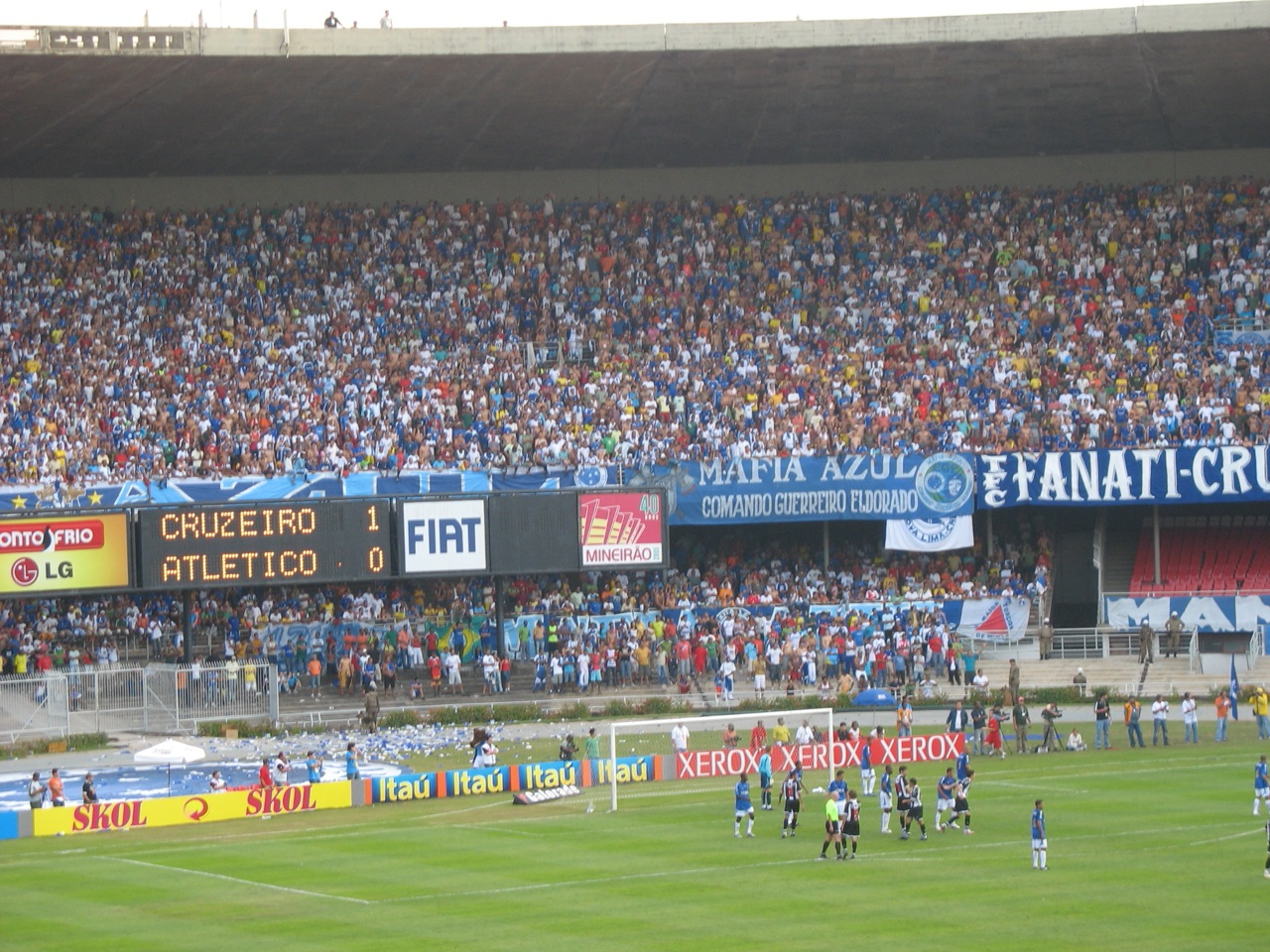 24 de junho de 2007: "estádio lotado viu o Cruzeiro vencer o Atlético por 4 a 2 - pena que eu não vi o segundo tempo."